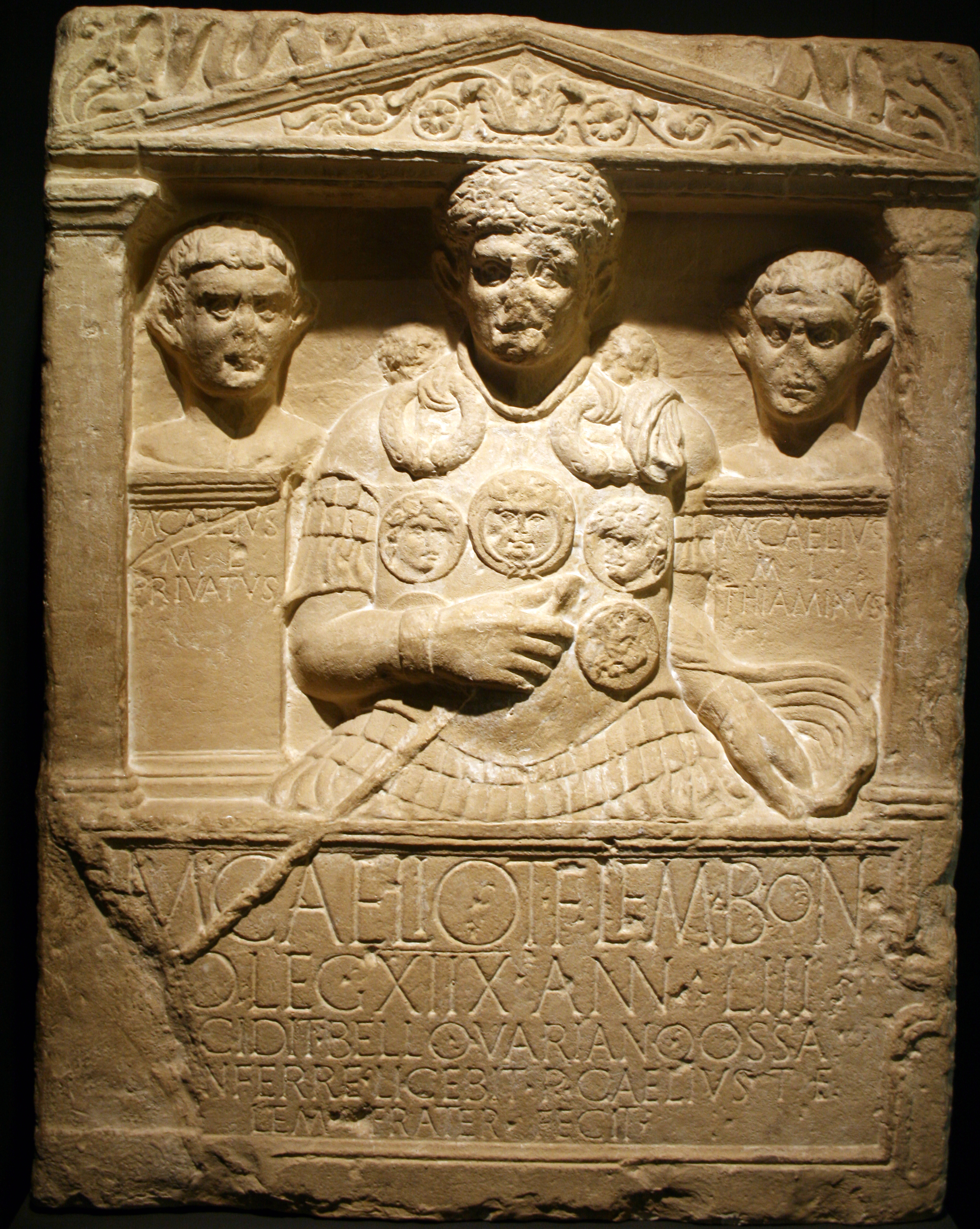 Epitaph des in der Varusschlacht umgekommenen Centurios Marcus Caelius und seiner Freigelassenen. CIL XIII 8648 = AE 1952, 181 = AE 1953, 222 = AE 1955, 34